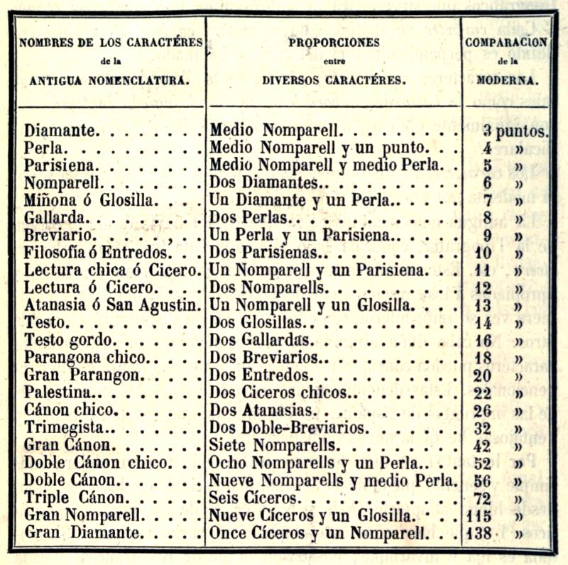 Detalle de la página 94 del tratado de Antonio Serra y Oliveres Manual de la tipografía española, o sea arte de la imprenta, Madrid 1852. Reproducción de mi ejemplar.